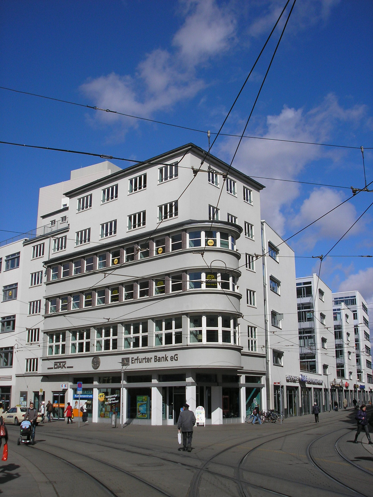 Das Geschäftshaus Anger 81 (früher Johannesstraße 182) in Erfurt (Thüringen), erbaut 1928 von Heinrich Herrling („Poliklinik“).